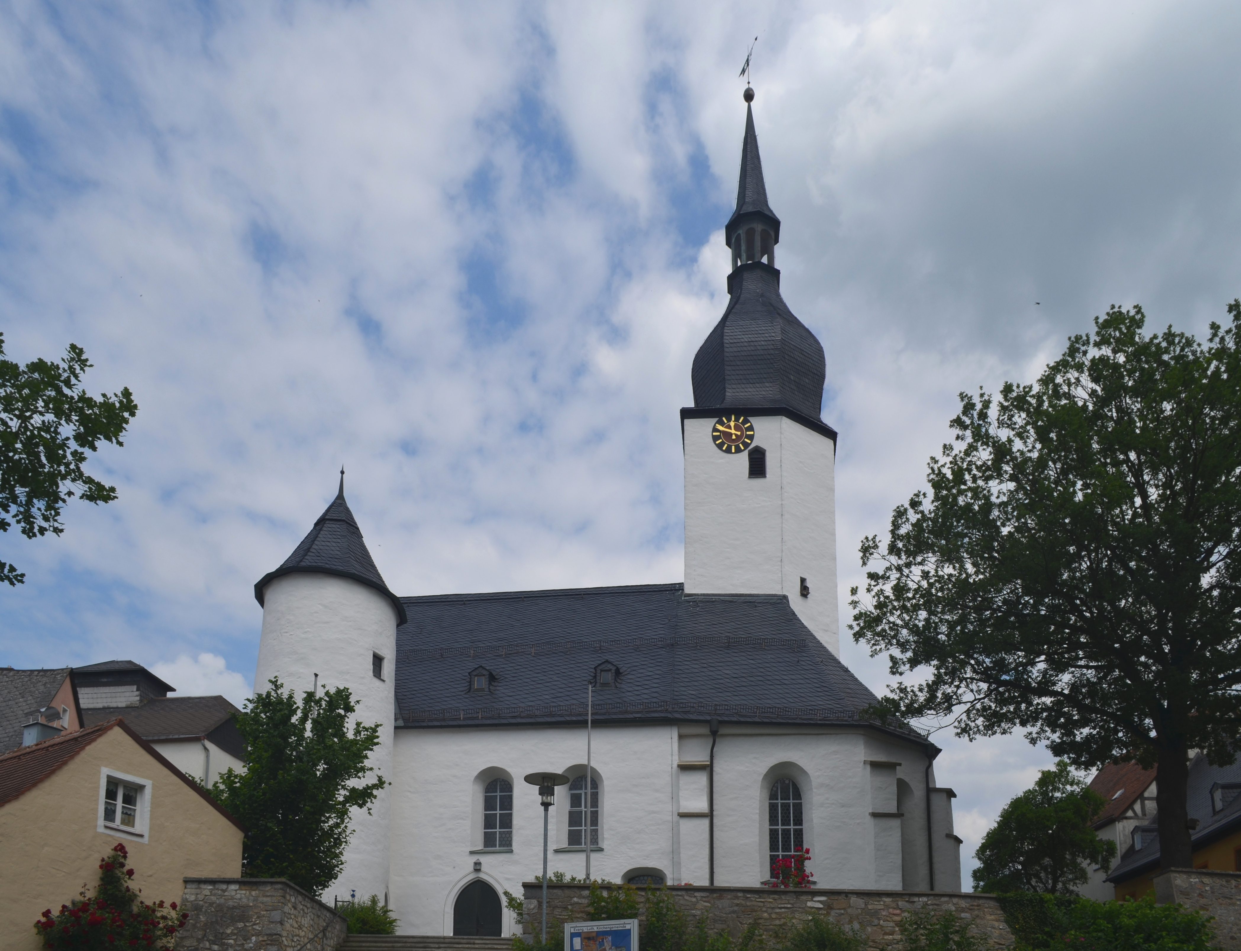 Thiersheim (Oberfranken-Deutschland) - Evangelisch-lutherische Sankt Ägidien Pfarrkirche.